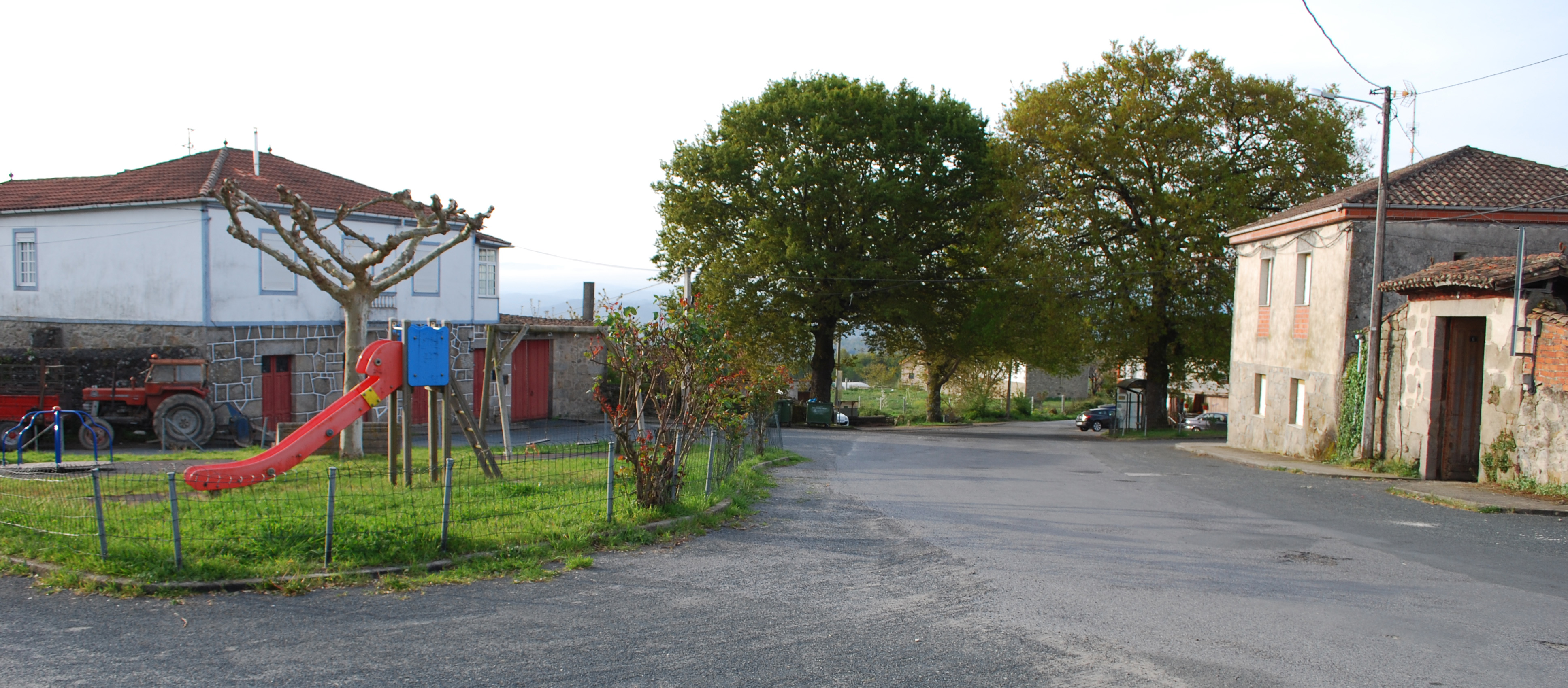 Vista de Goian en Ferreira de Patón Lugo Galiza Spain